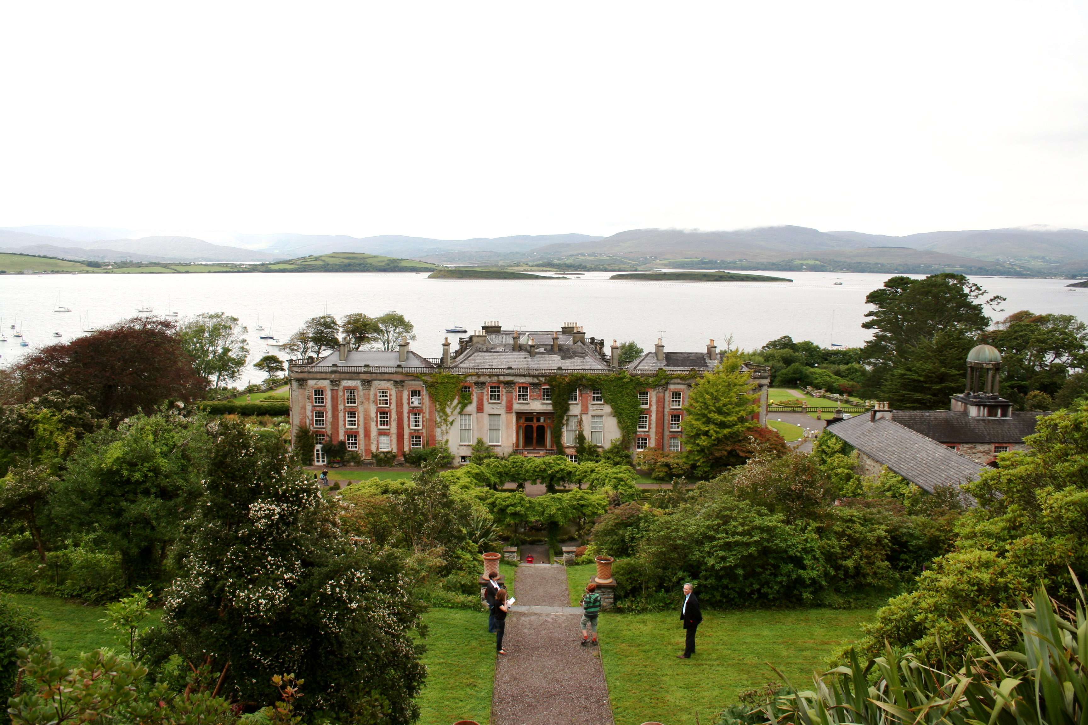 Bantry House en la bahía de Bantry